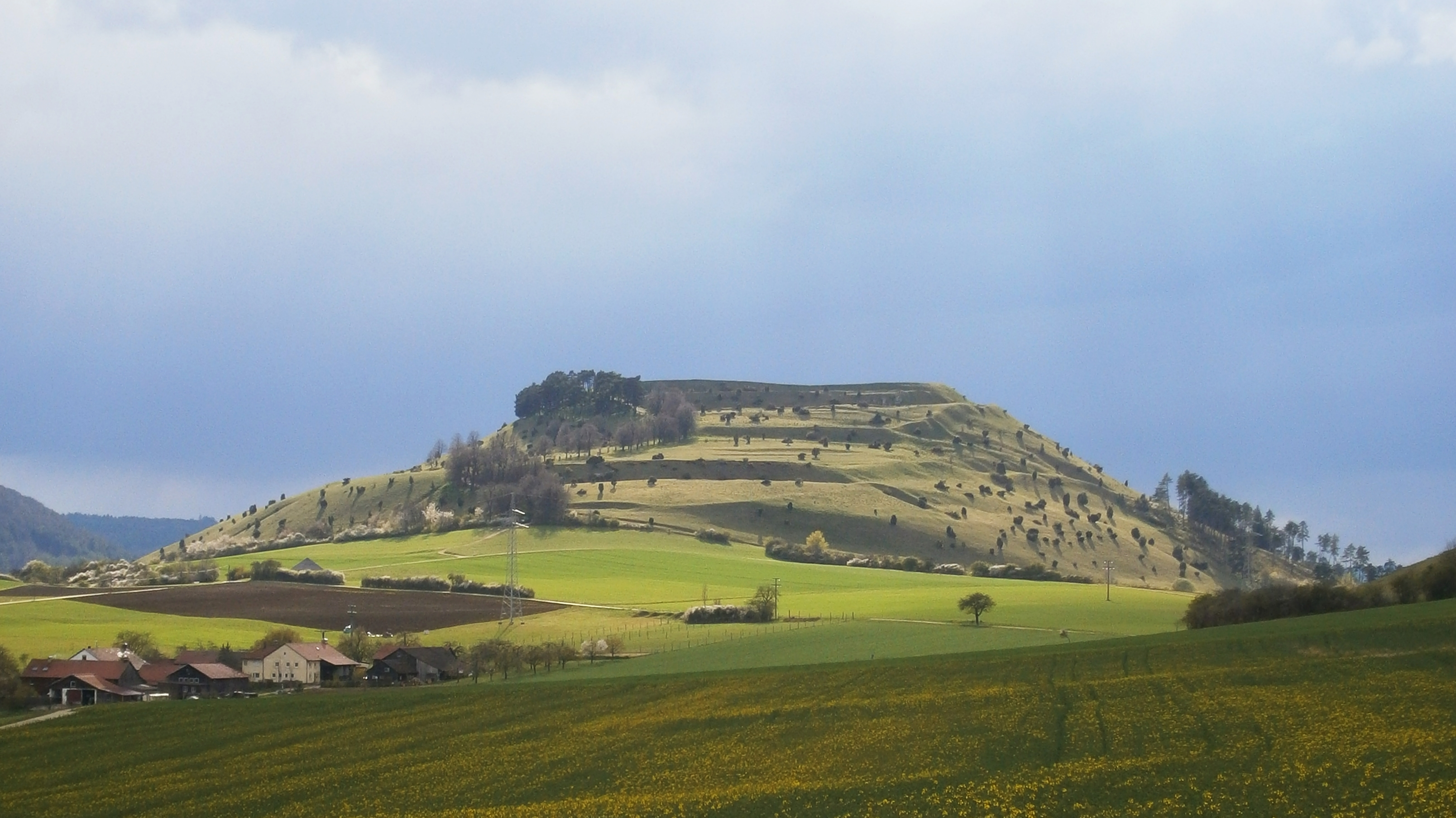 Ipf bei Bopfingen, fotografiert aus Richtung Nord- Ost